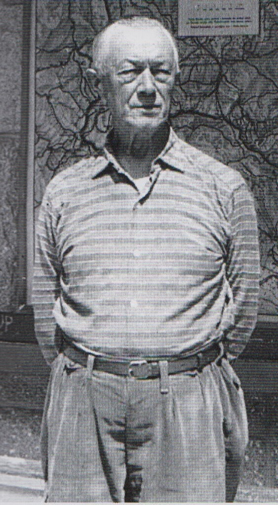 Horolezec a zakladateľ horolezeckého spolku JAMES František Lipták. * 29.9.1894 Kežmarok- +7.11.1967 Kežmarok, Slovakia